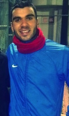 Mustafa Durak antrenmanda